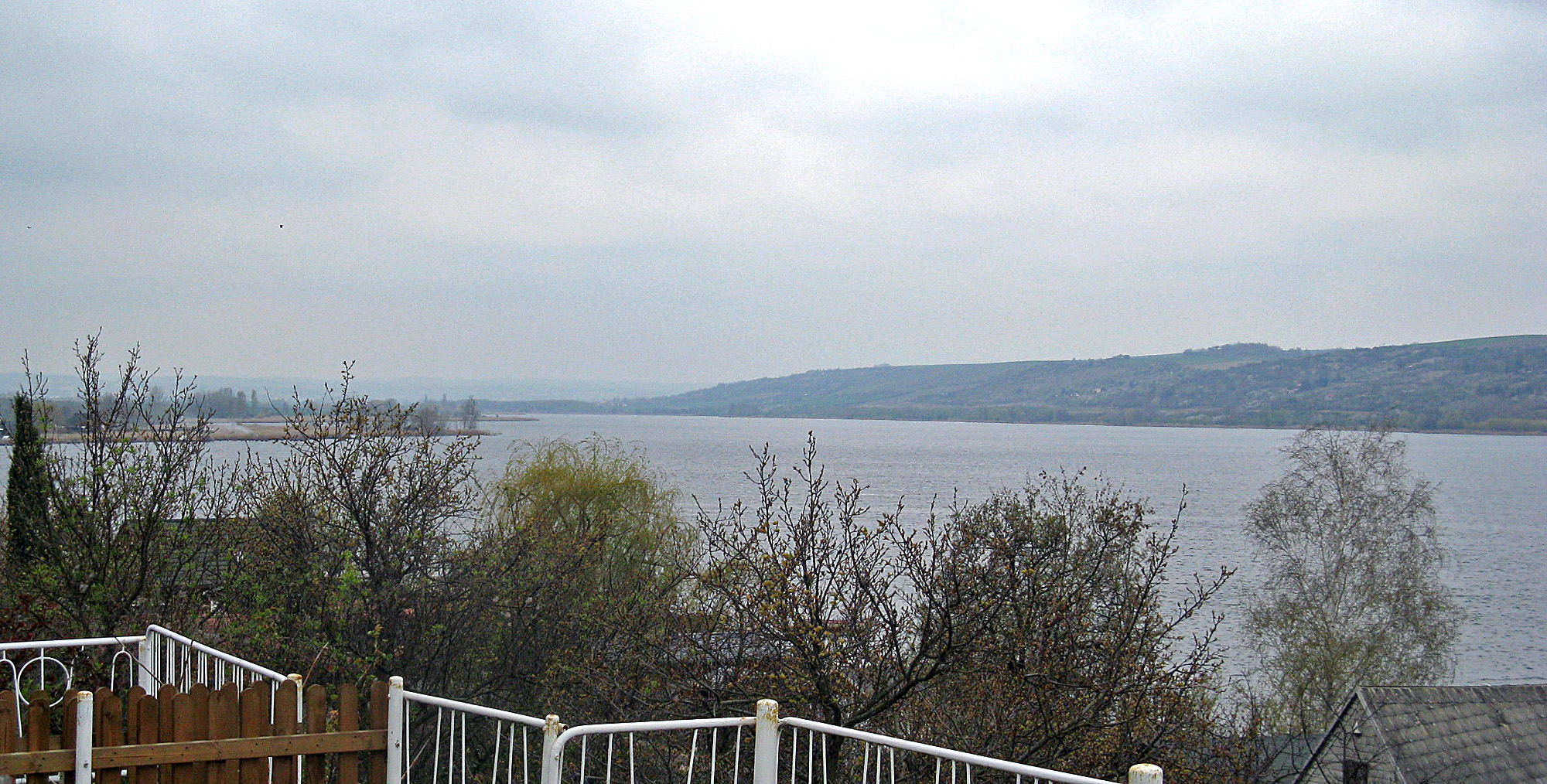 Der Süße See ist ein See im Landkreis Mansfeld-Südharz in Sachsen-Anhalt, Deutschland.